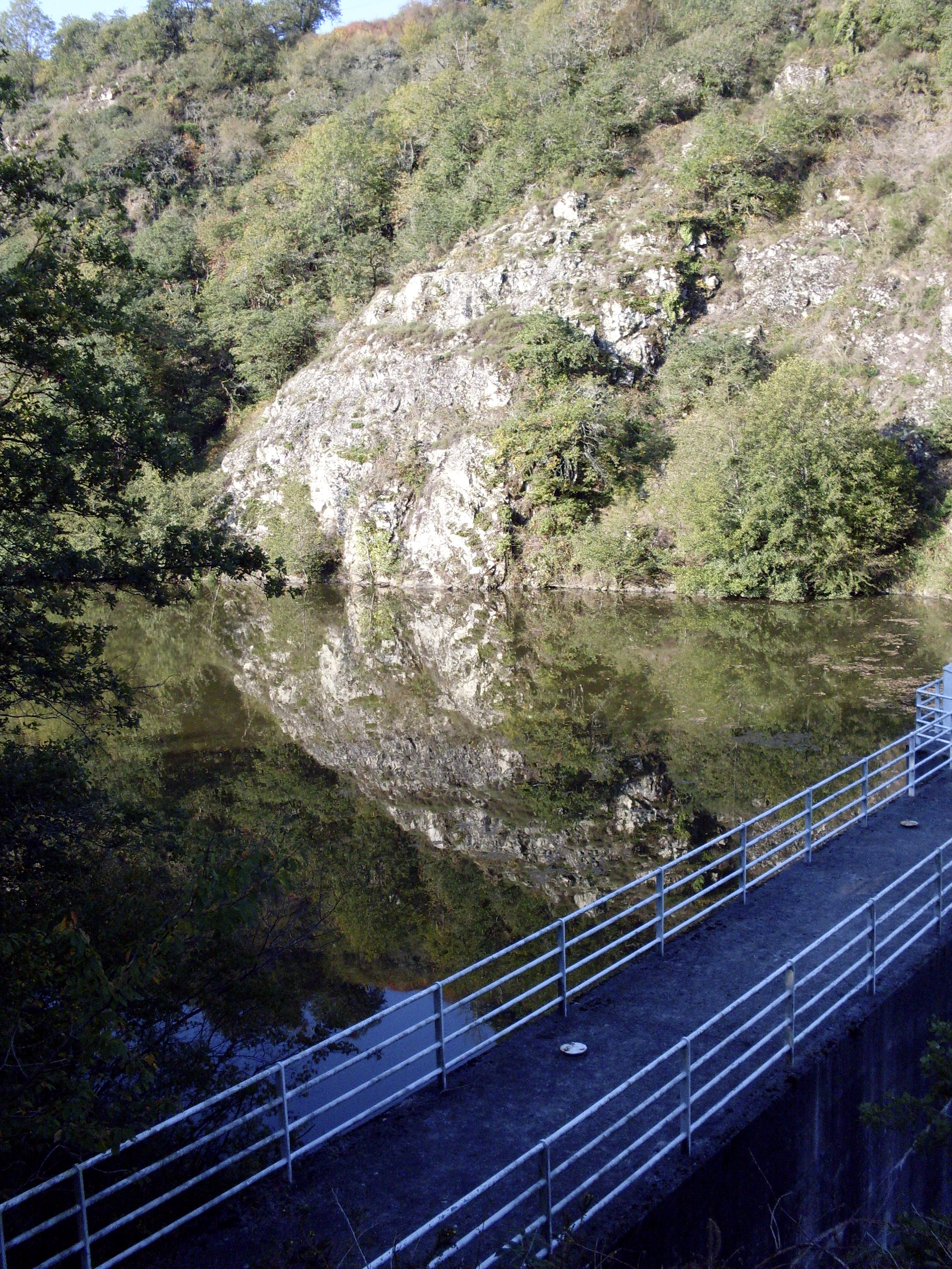 Barrage de l'Issoire sur la commune de Saint-Germain-de-Cofolens, Charente, France